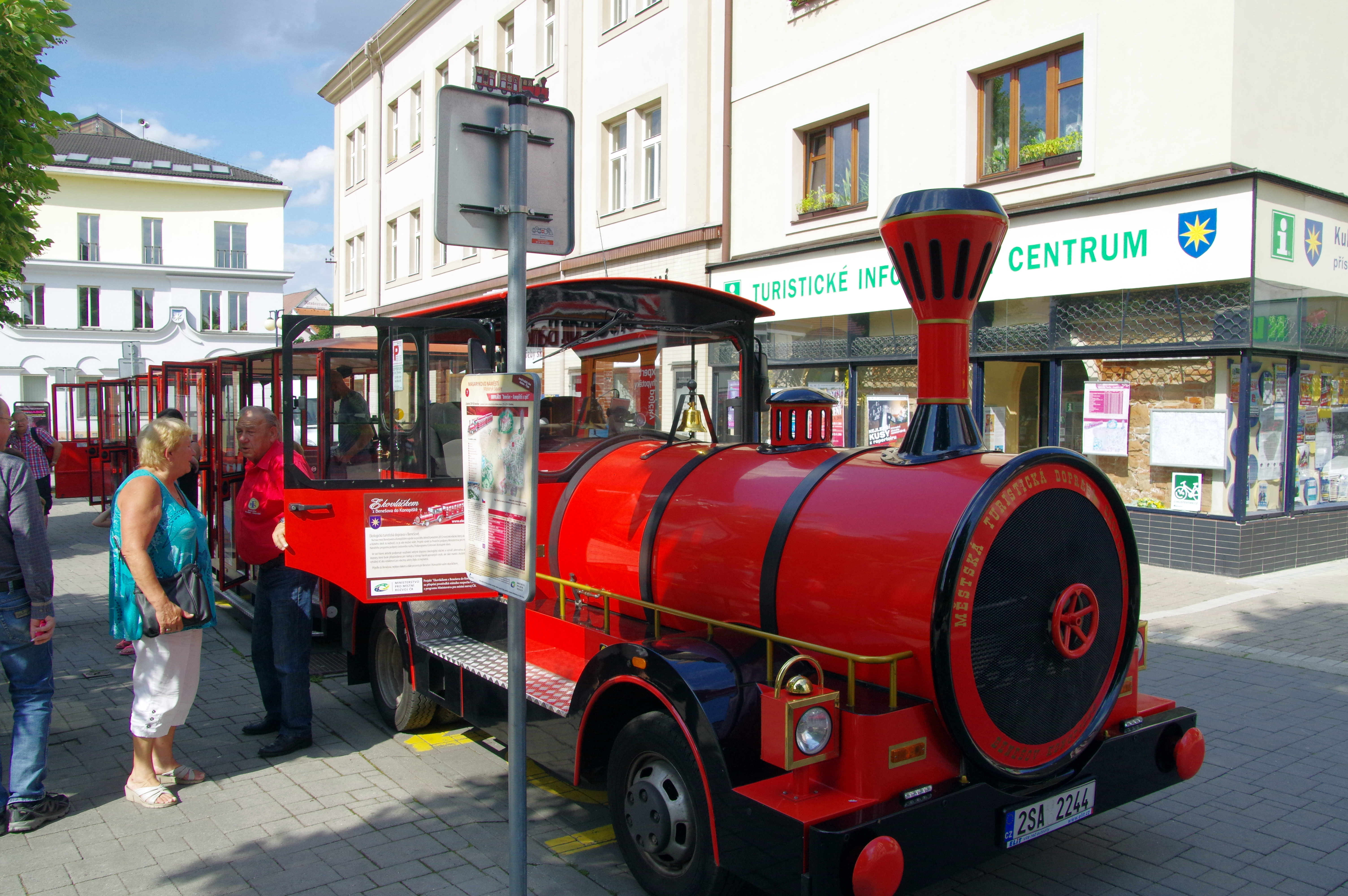 Benešov, Masarykovo náměstí, silniční vláček.